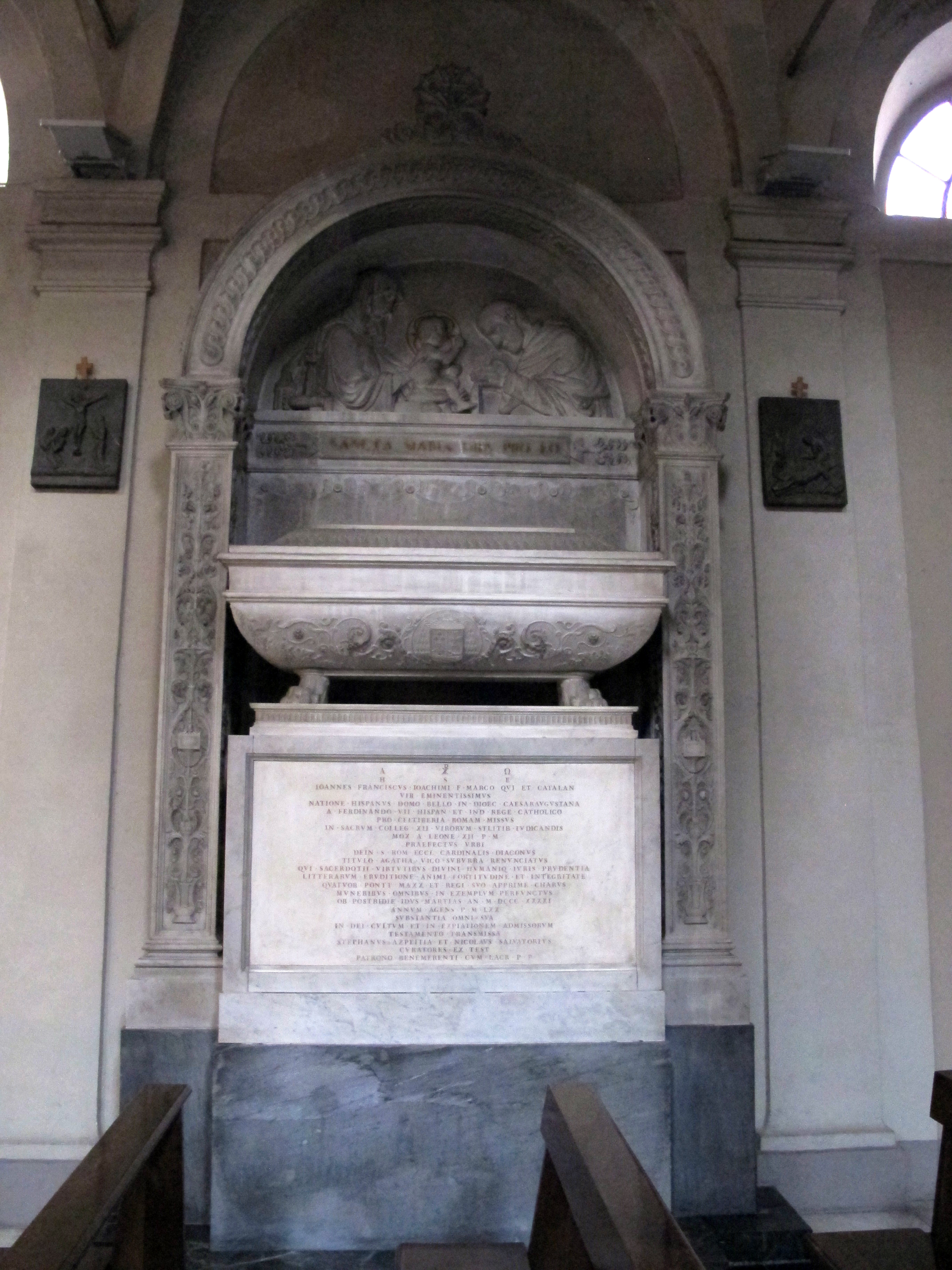 Sant'agata dei goti, monumento al cardinale giovanni francesco di marco y catalan